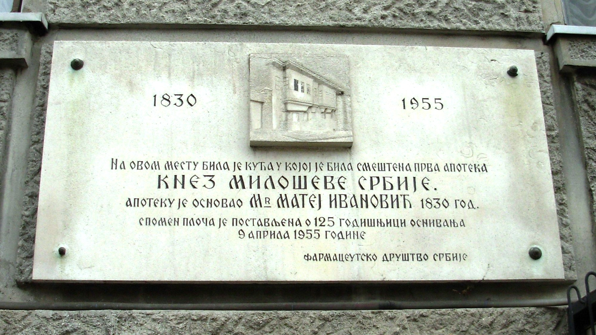 Tabla u ulici Kralja Petra I u Beogradu. Slikao Goldfinger